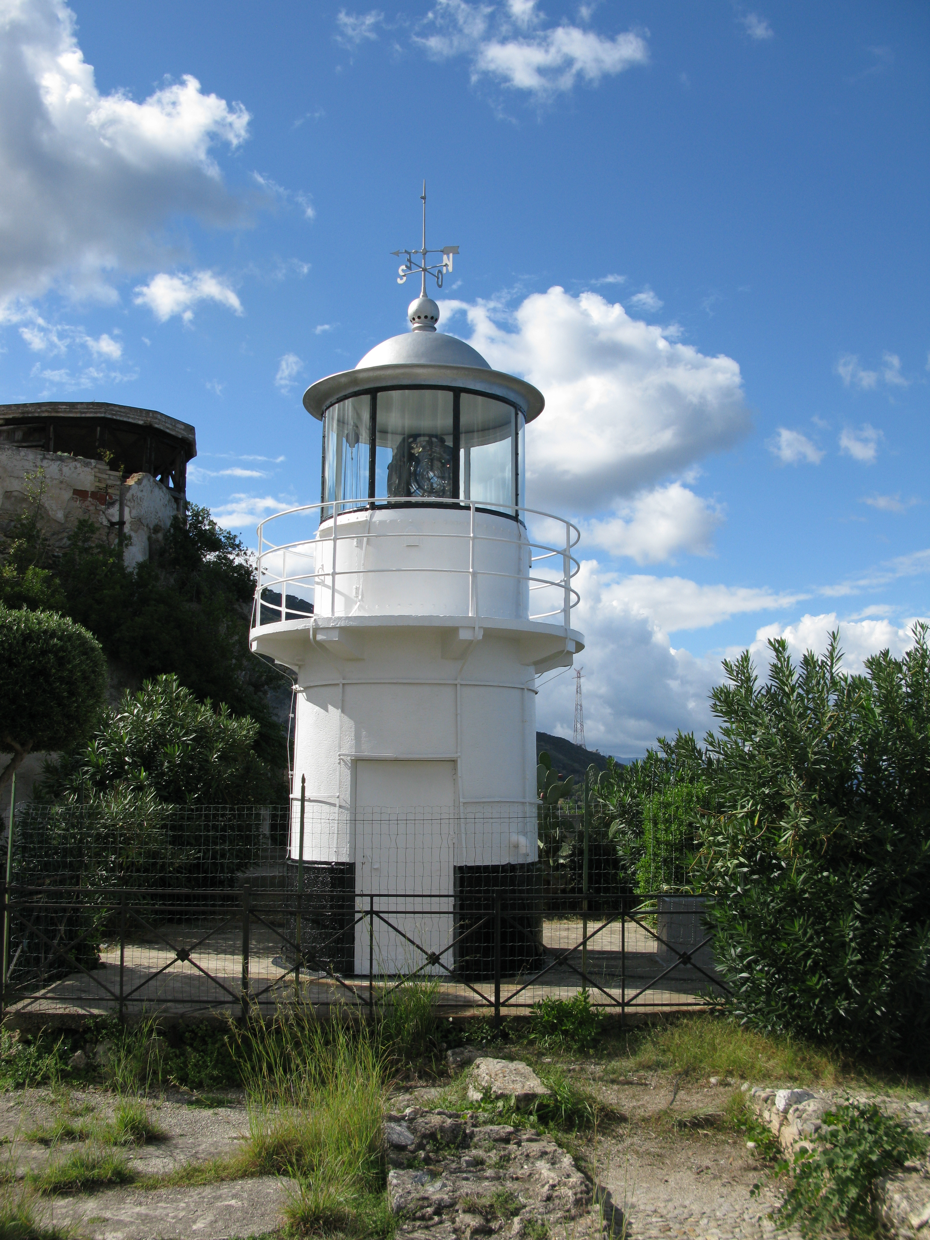 Faro di Scilla